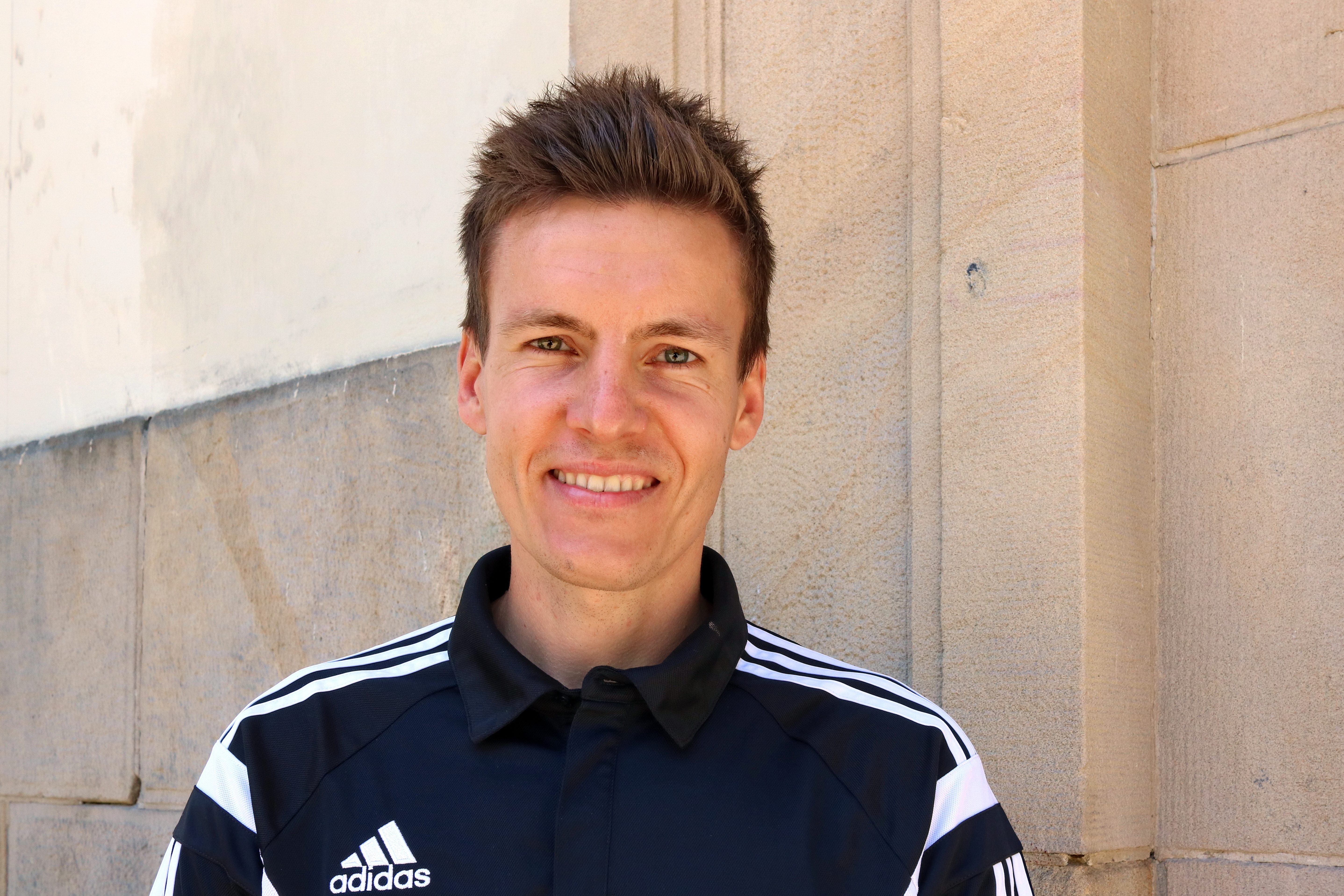 Daniel Siebert im Juni 2018 bei einem Fußballturnier am Rückert-Gymnasium in Berlin-Schöneberg